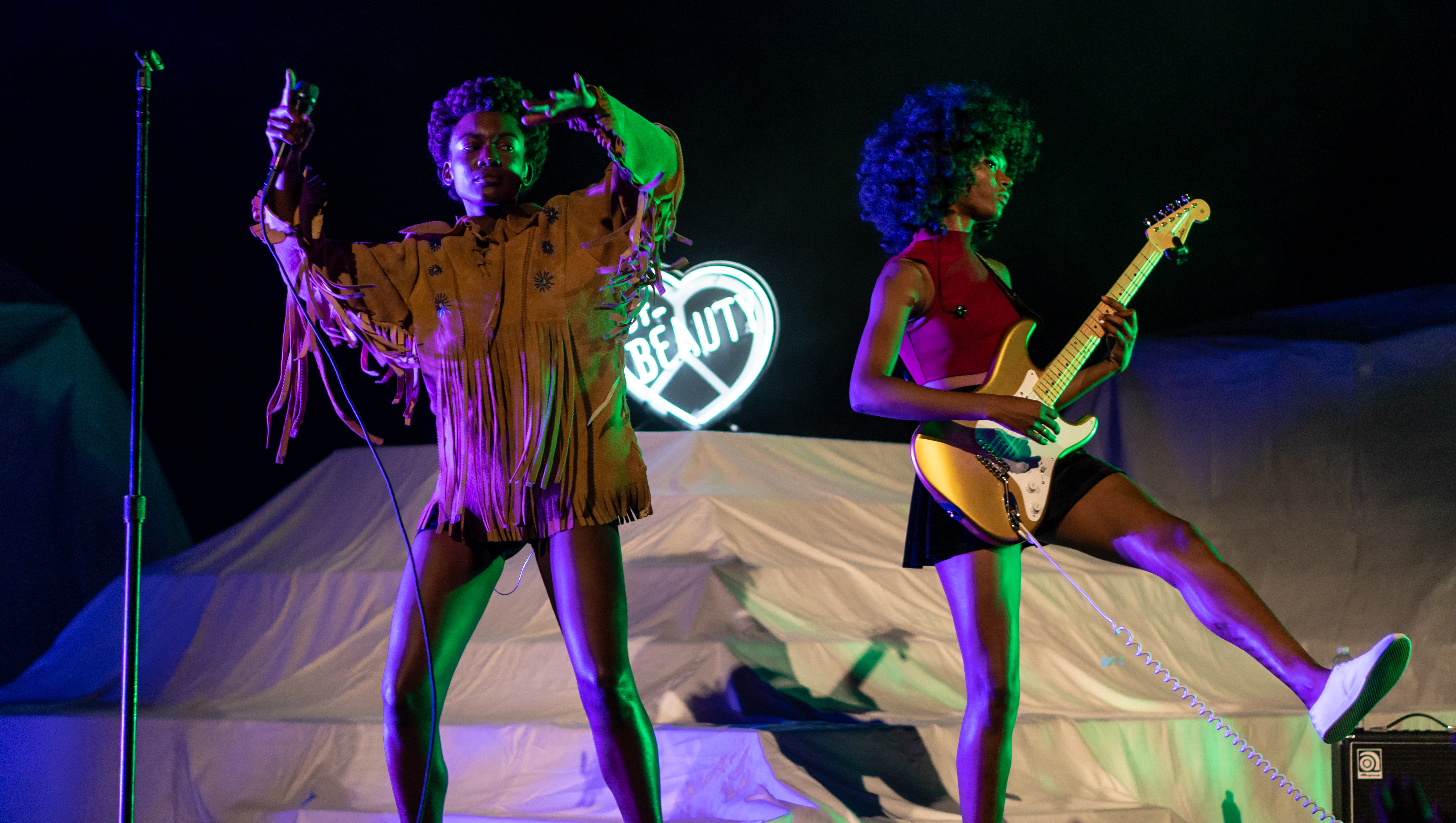 JMonaeHuluMSG190718-10